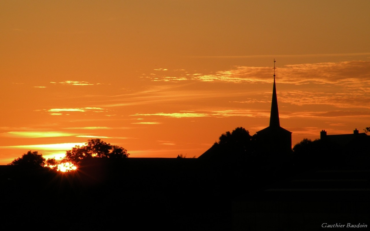 Photo du clocher de l'église de Noville lors d'un coucher de soleil estival.